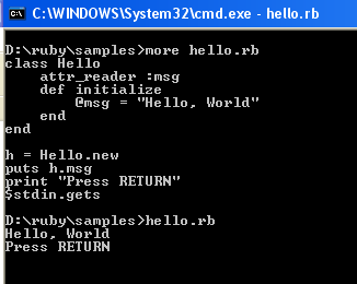 Ruby skjermbilde frå programeksekvering.